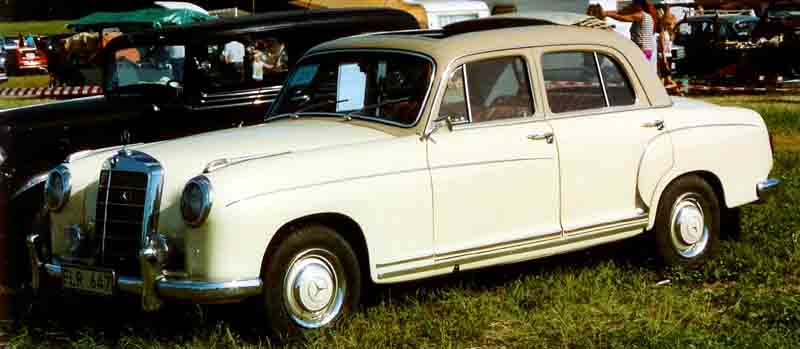 Mercedes-Benz 220SE Limousine 1959